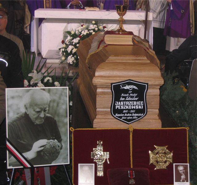 Zdzisław Peszkowski's funeral (1918-2007), Polish writer, catholic priest